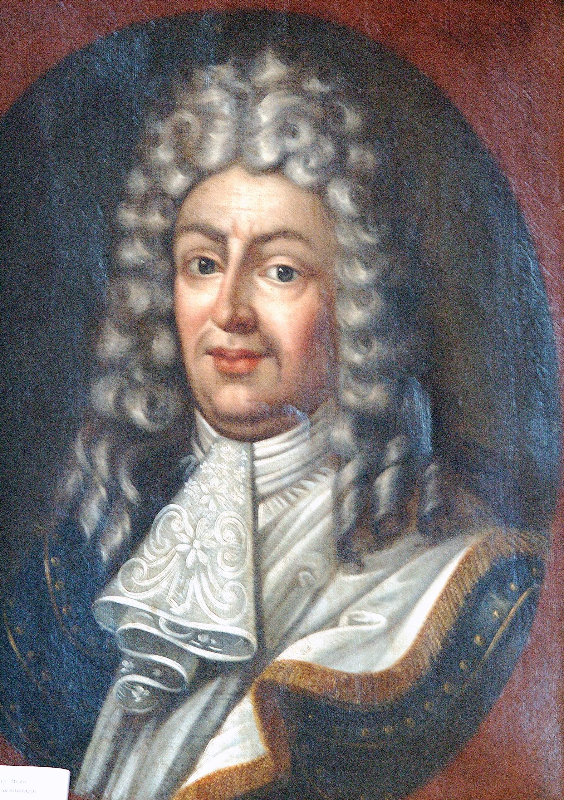 Fotografia własna istniejącego obrazu nieznanego autora.